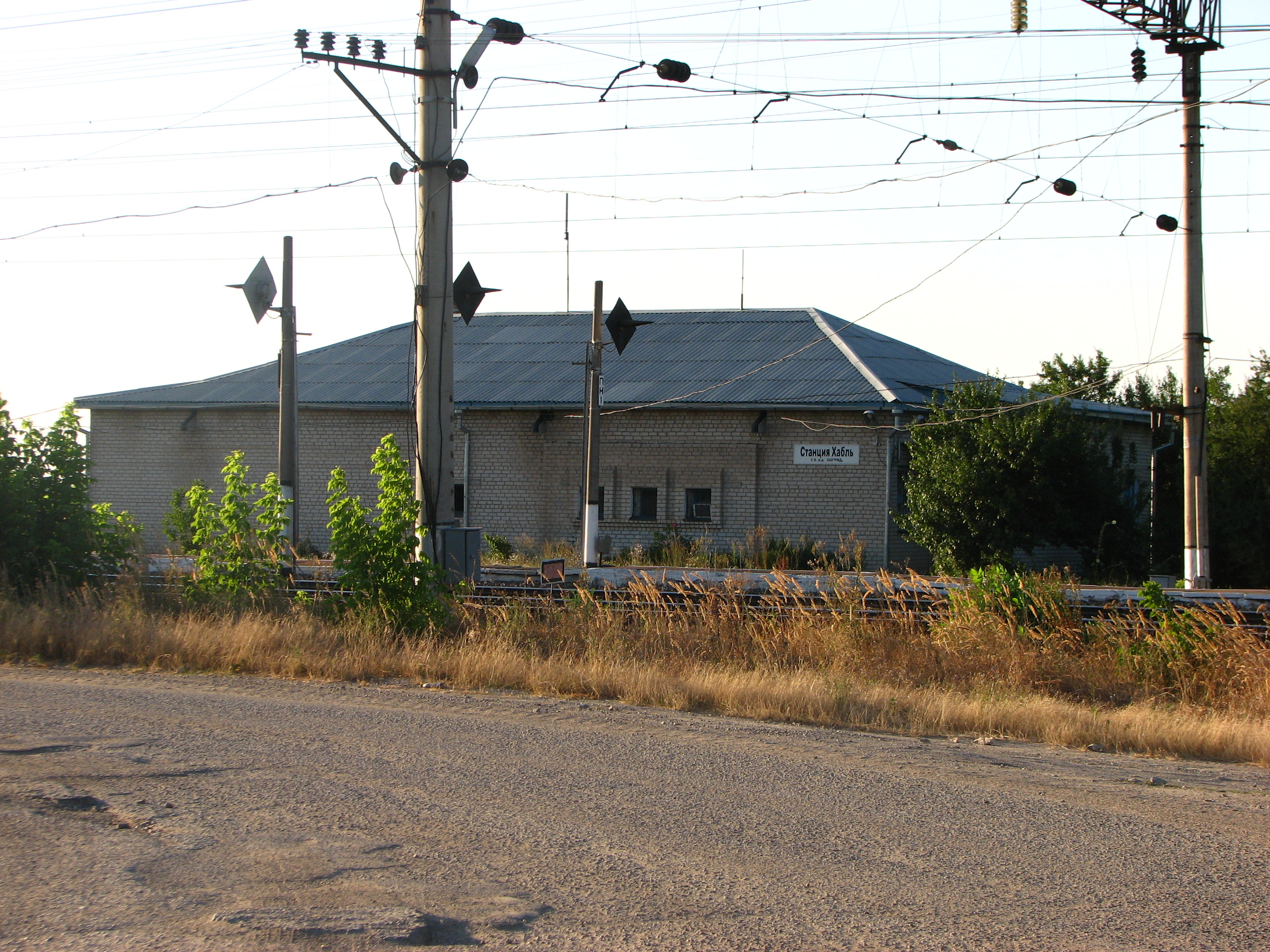 Железнодорожная станция Хабль